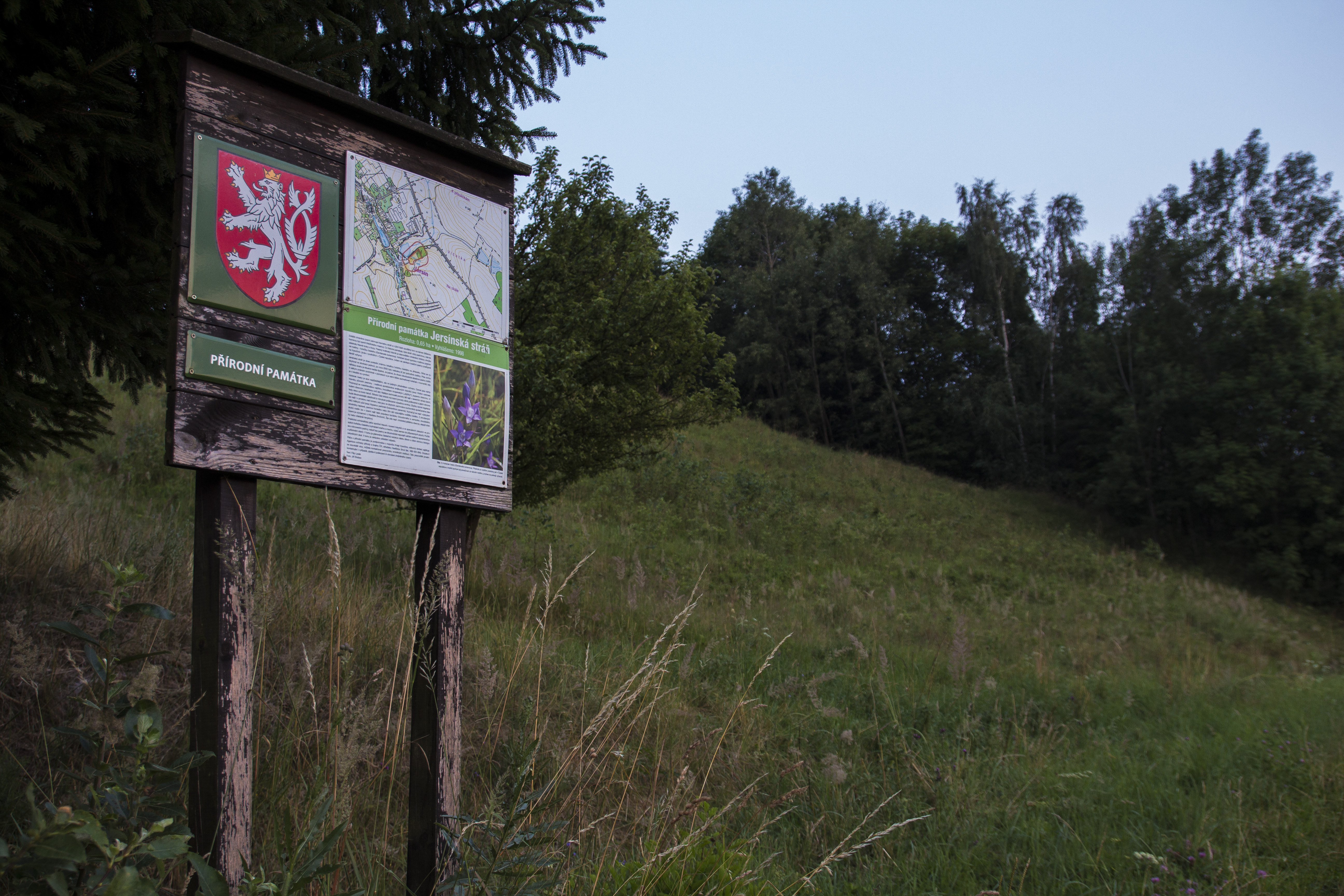 Jersínská stráň